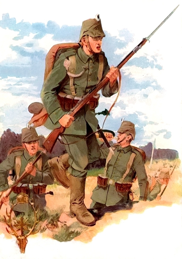 postkarte jaegerbund berlin